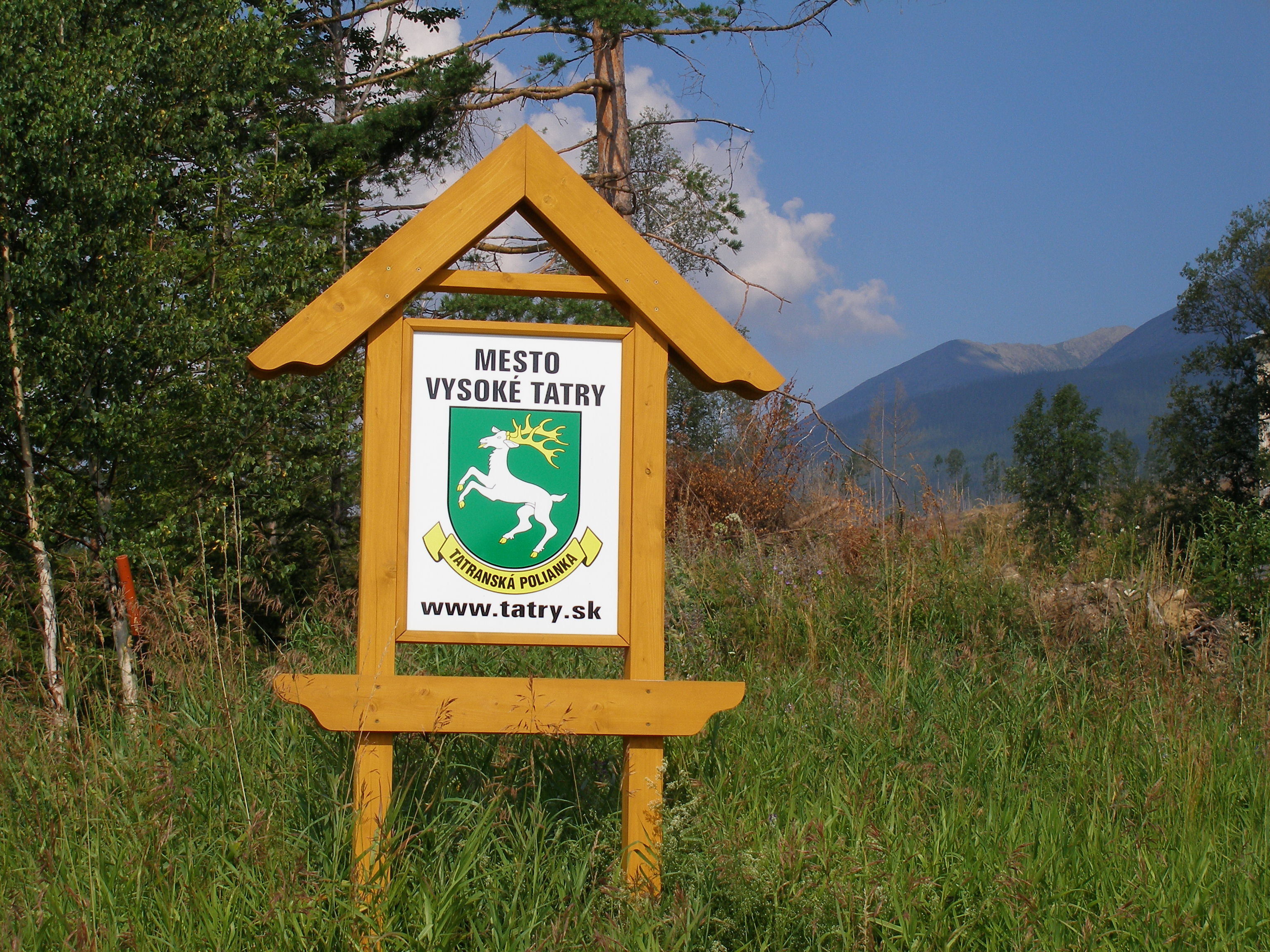 Osada Tatranská Polianka, Slovakia